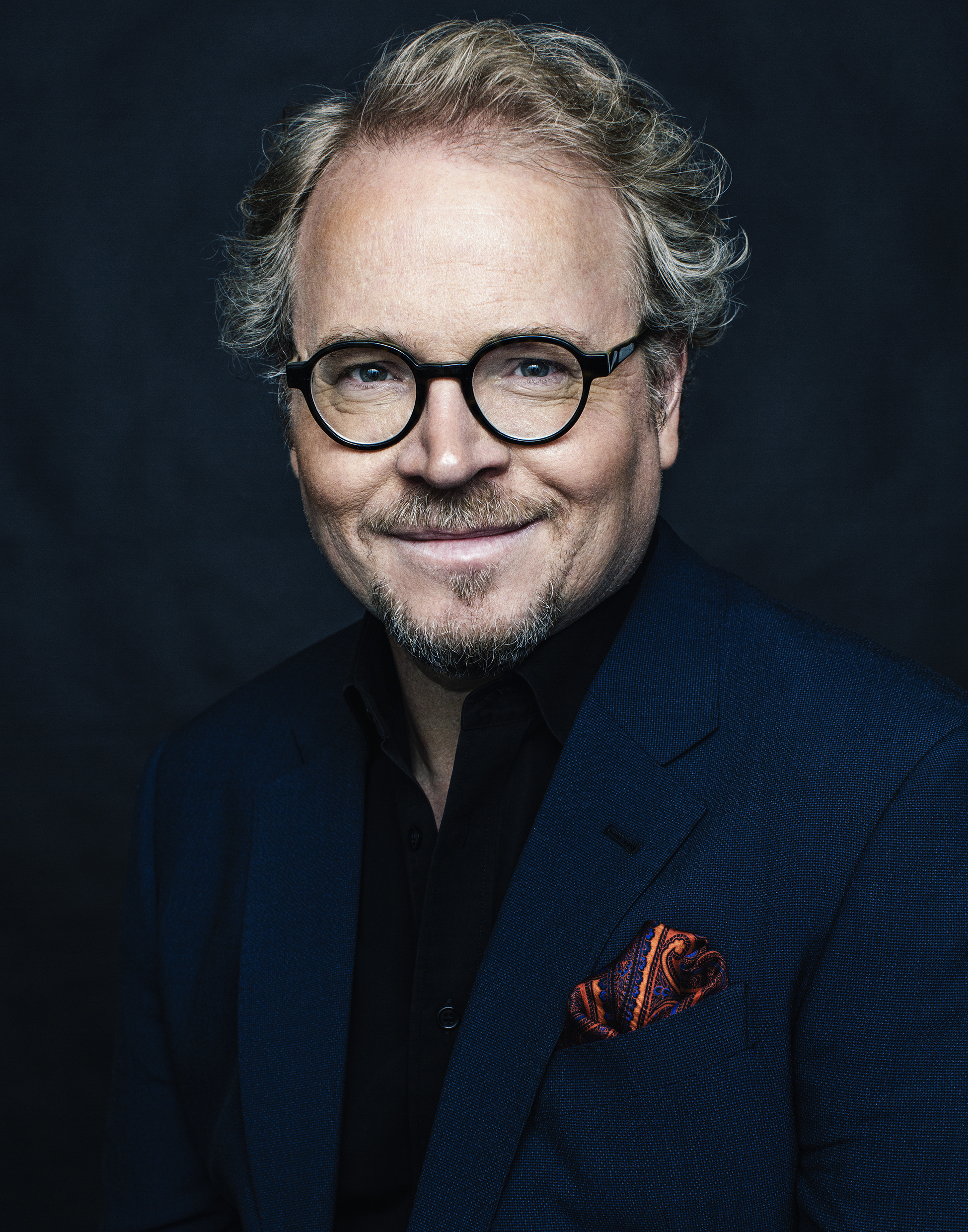 Programledaren, komikern och språkforskaren Fredrik Lindström.